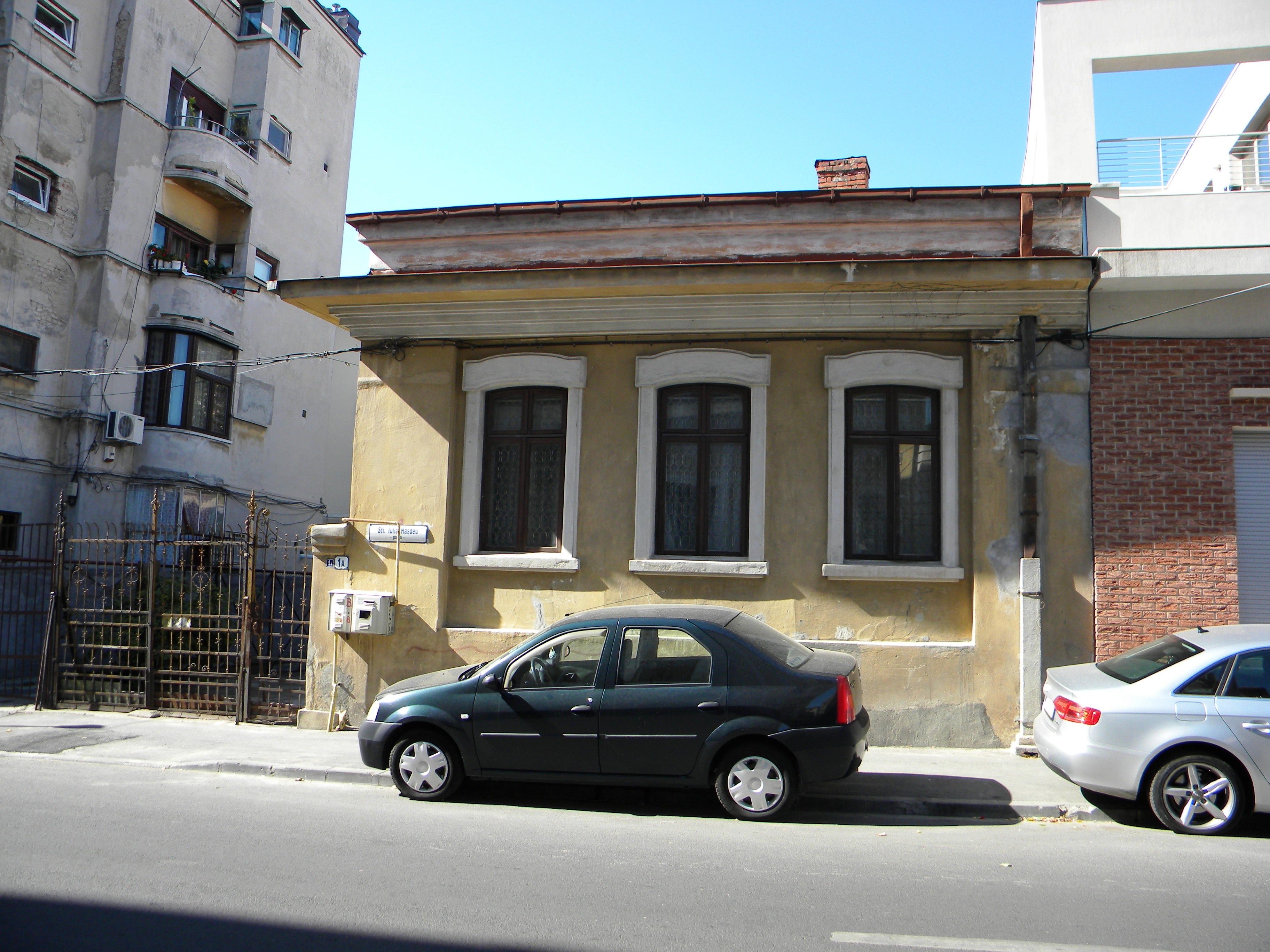 Bucuresti, Romania, Casa pe Str. Iulia Hasdeu nr. 1A, sect. 1